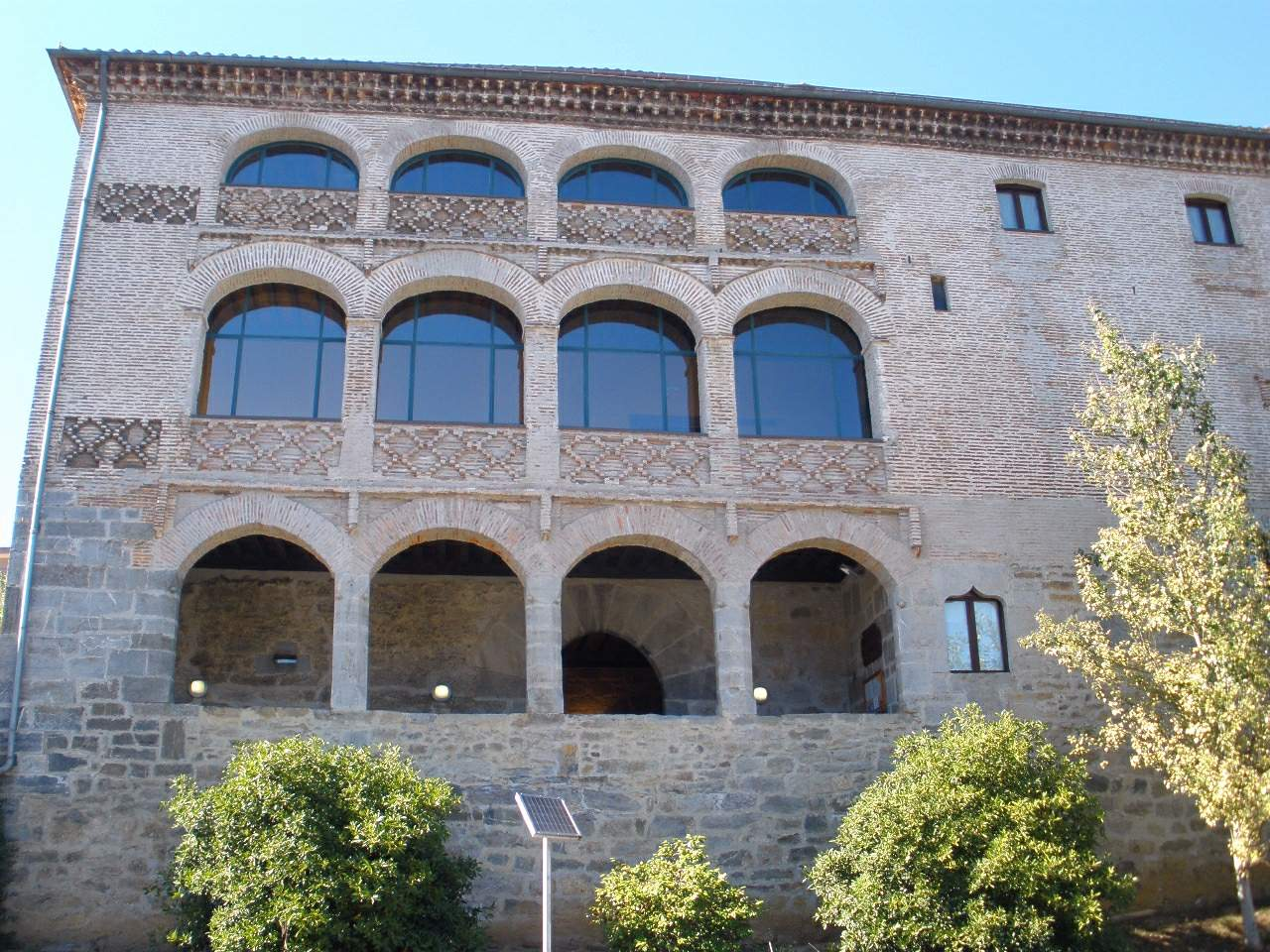 Azkoitia - Casa-Torre Floreaga